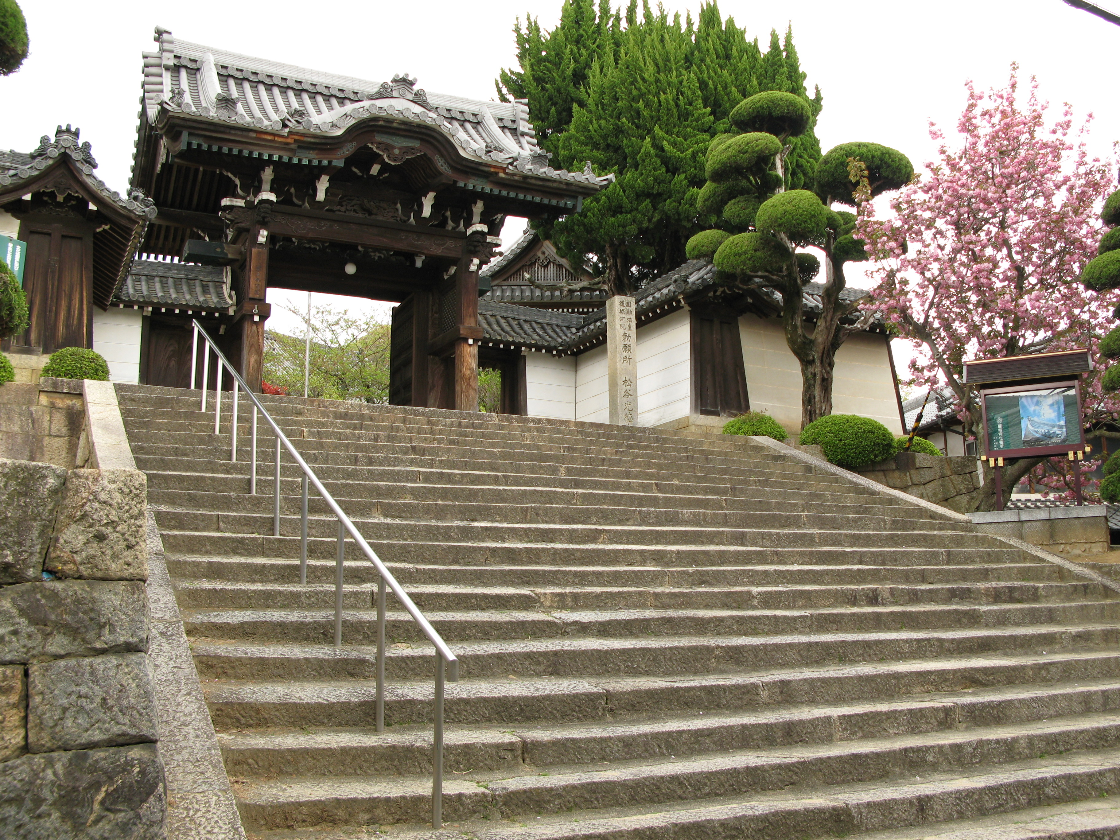 Koutokuji in Kashiwara, Osaka, Japan